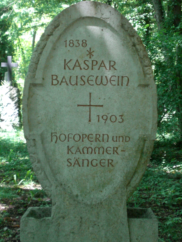 Grab des Sängers Kaspar Bausewein (1838-1903) auf dem Alten Südlichen Friedhof in München